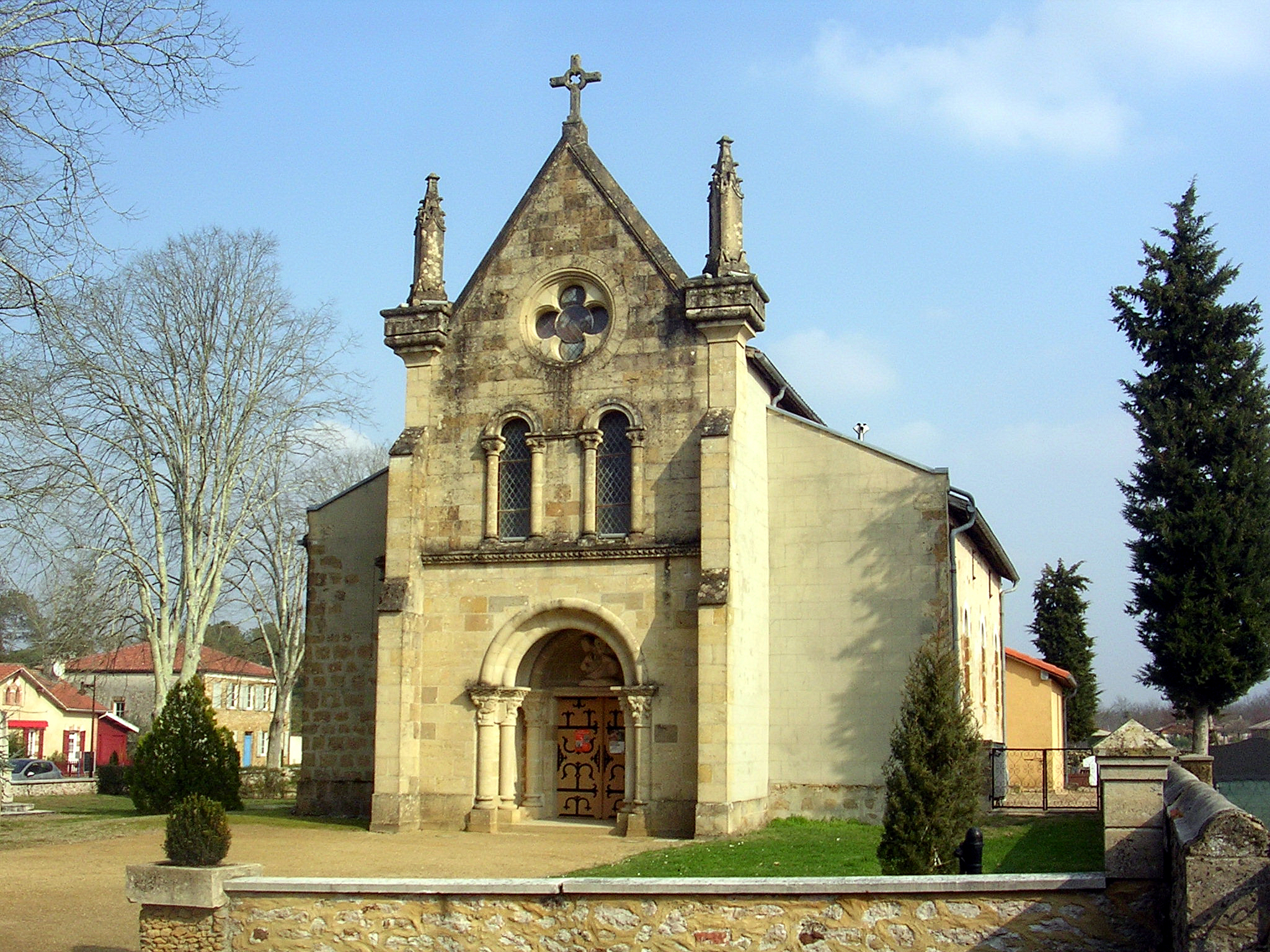 Église Sainte-Croix de Campet, à Campet-et-lamolère, dans le département français des Landes